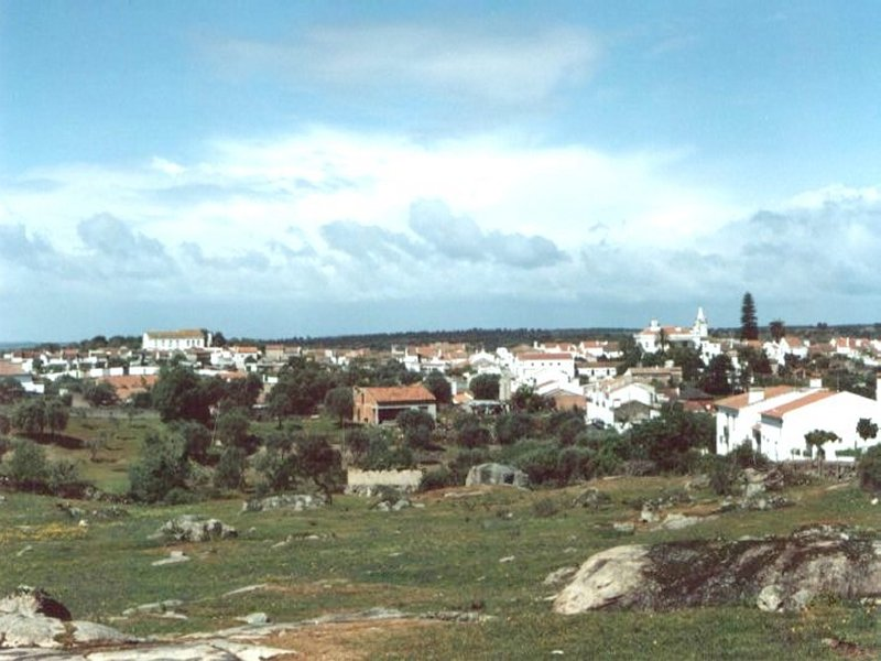 Aldeia da Mata vista do lado do sol nascente. João Farinha